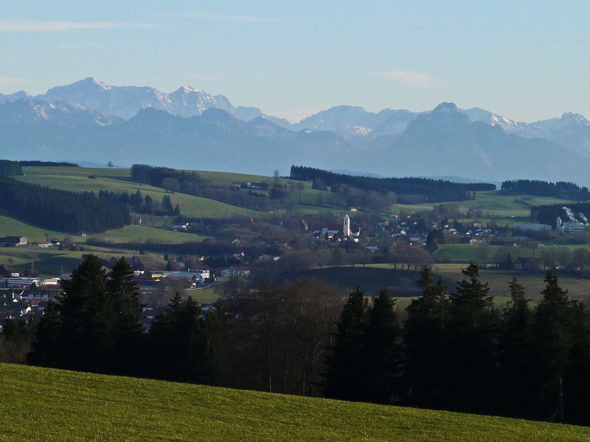 Günzach mit Alpenpanorama